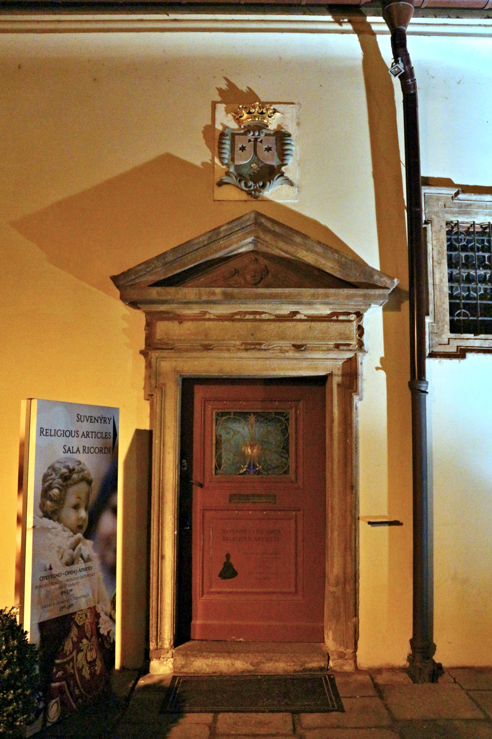 Klášter bosých karmelitánů na Malé Straně